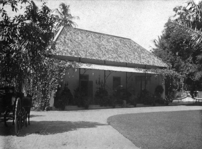 Foto. Het huis van J. Boot te Klaten, Midden-Java